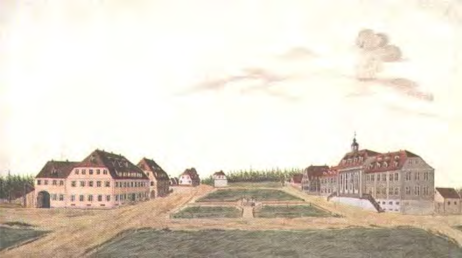 Königsfeld im Schwarzwald - Ansicht des Zinzendorfplatzes von Osten (um 1814)